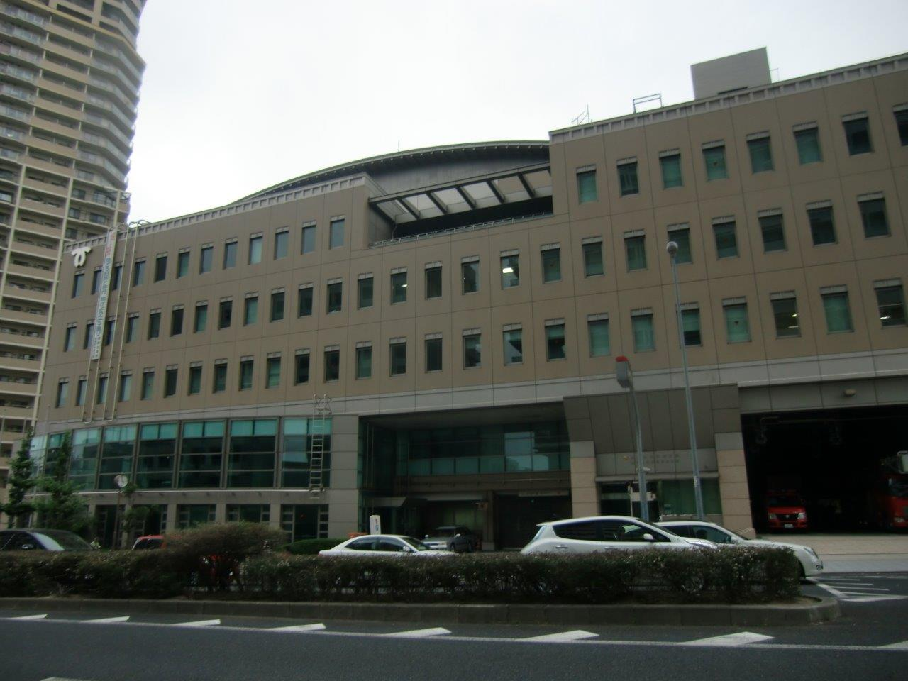 東灘区役所、国道2号線より南から